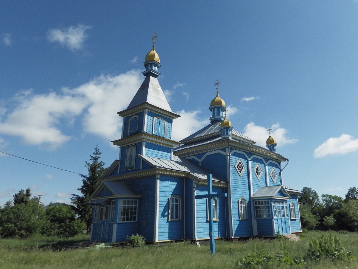 Церква Свято-Покровська, с.Зарубенці